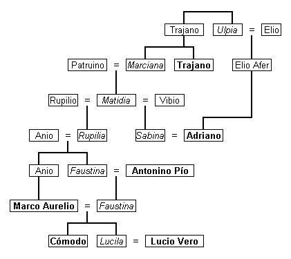 Árbol genealógico detallado de los emperadores antoninos